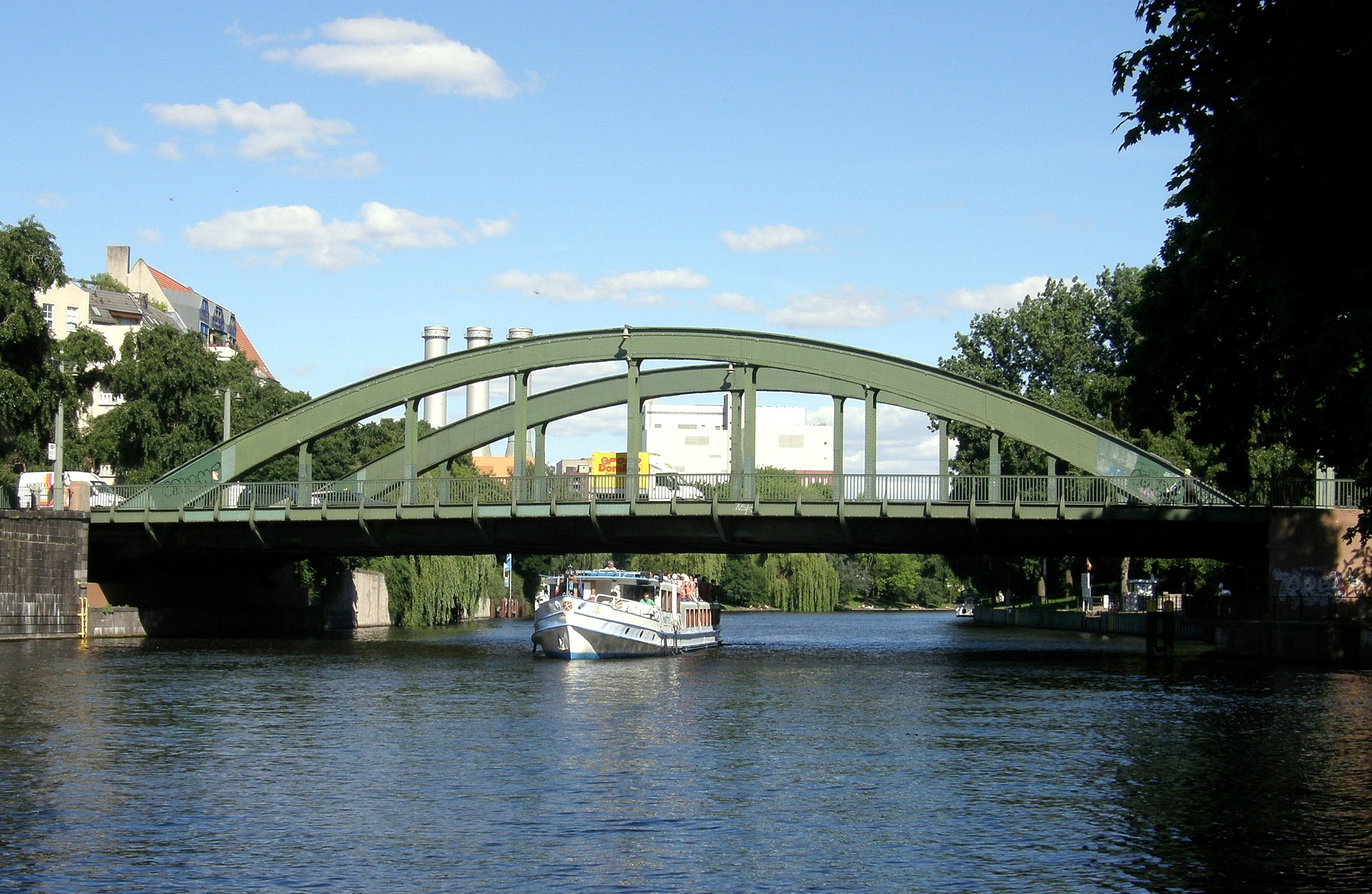 Schloßbrücke über die Spree in Berlin-Charlottenburg